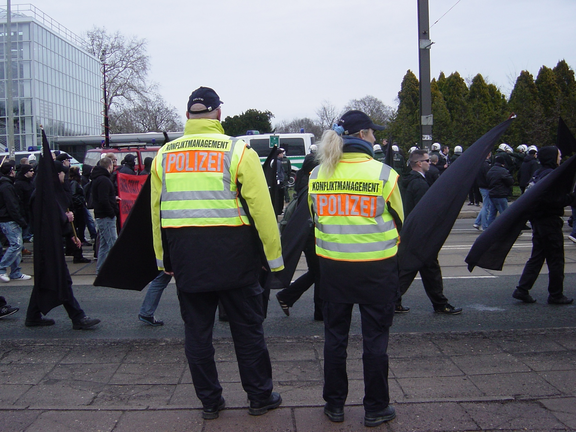 Gedenkmarsch Magdeburg 2011 - Polizei Konfliktmanagement, Schönebecker Straße, Gruson-Gewächshäuser